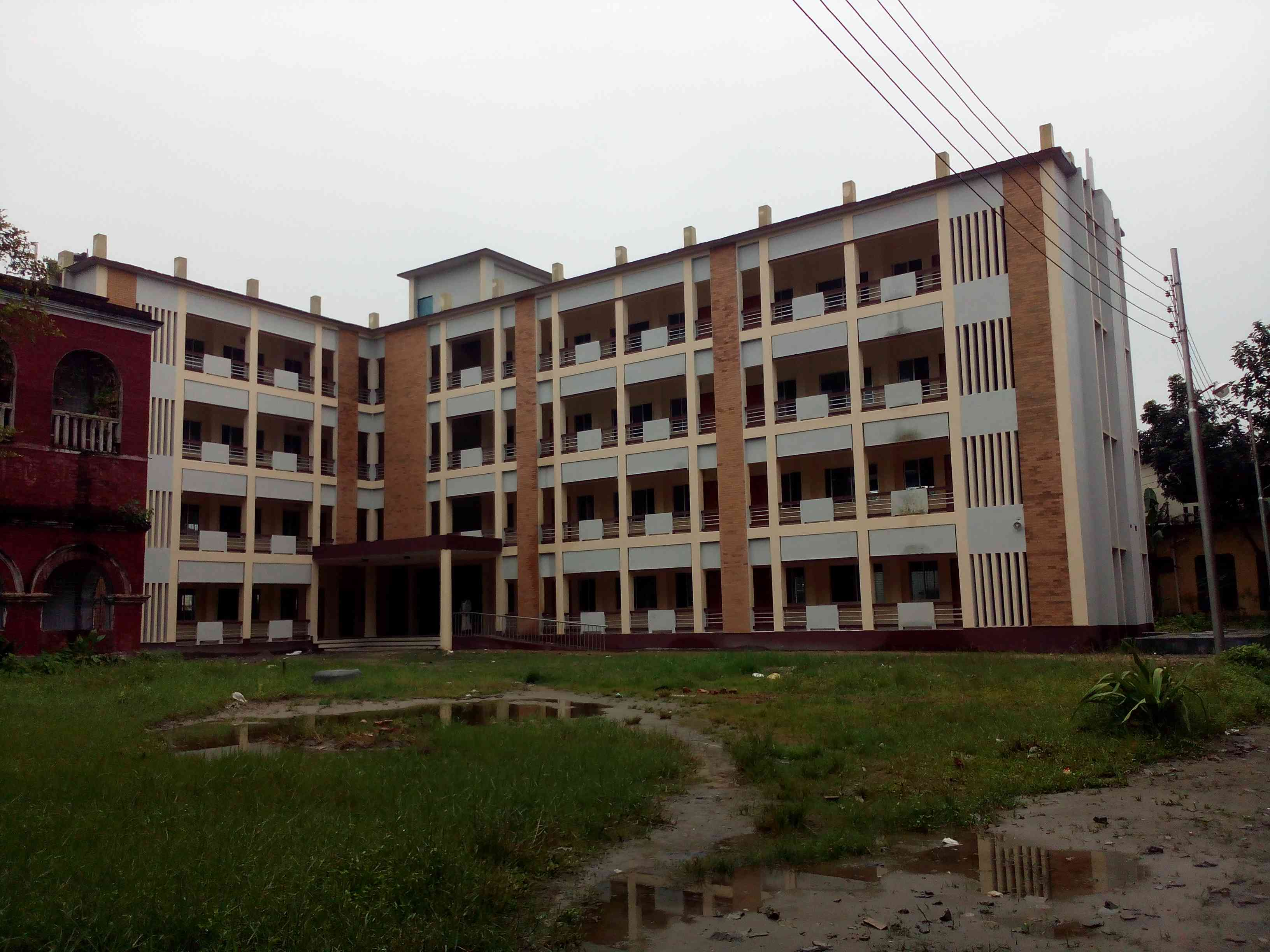 আনন্দমোহন কলেজের উচ্চ মাধ্যমিক শিক্ষা কার্যকমের জন্য নির্মিত নতুন ভবন